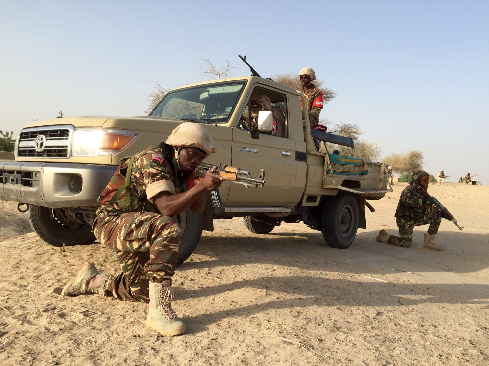 Dans le village de Zenam Kelouri, les soldats nigériens procèdent à une démonstration de force de leur lutte contre Boko Haram, le 29 février 2016. (VOA/Nicolas Pinault)